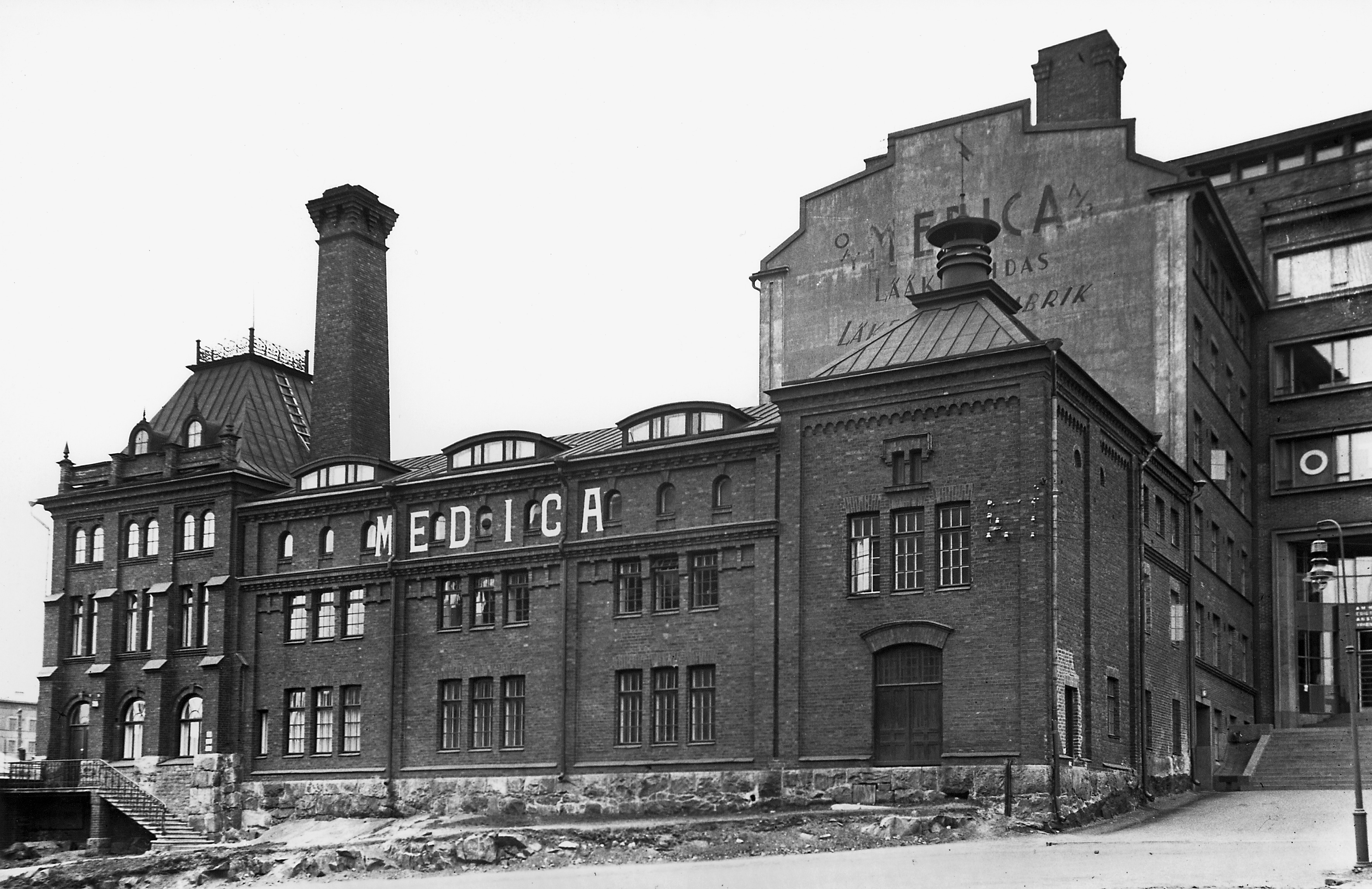 Töölönkatu 26. Westerlundin karamellitehdas, myöhemmin Medican lääketehdas. Arkkitehti Josef Stenbäck ja laajennusoasan arkkitehti K.G. Grahn, 1800–1900-luvun vaihde. Talo purettu 1970-luvun alussa.